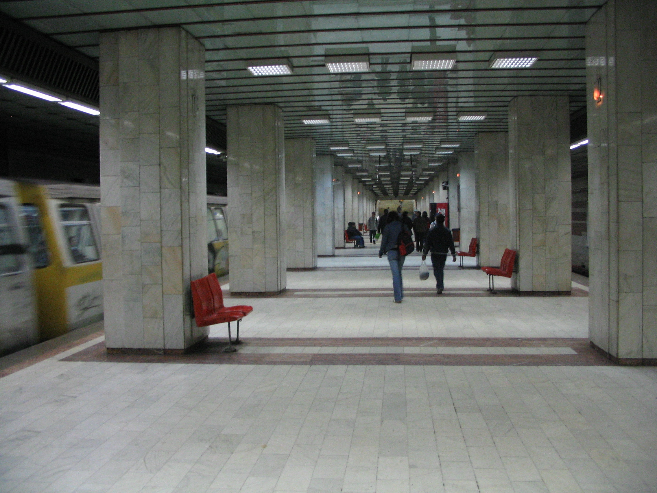 Inside the Armata Poporului metro station, Bucharest, Romania